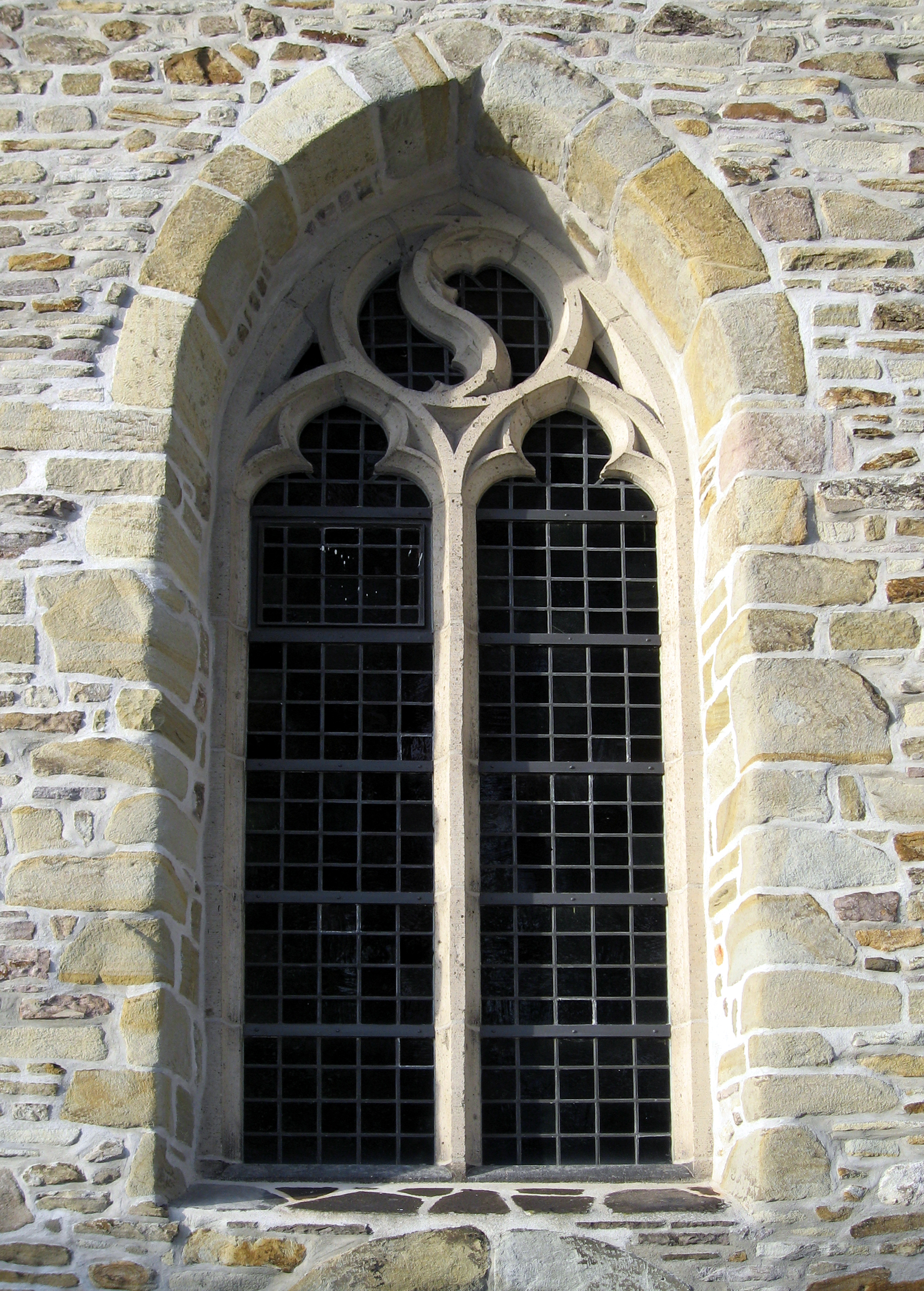 Bochum Stiepel, Stiepeler Dorfkirche, linkes Südfenster des Hauptkirchenraumes